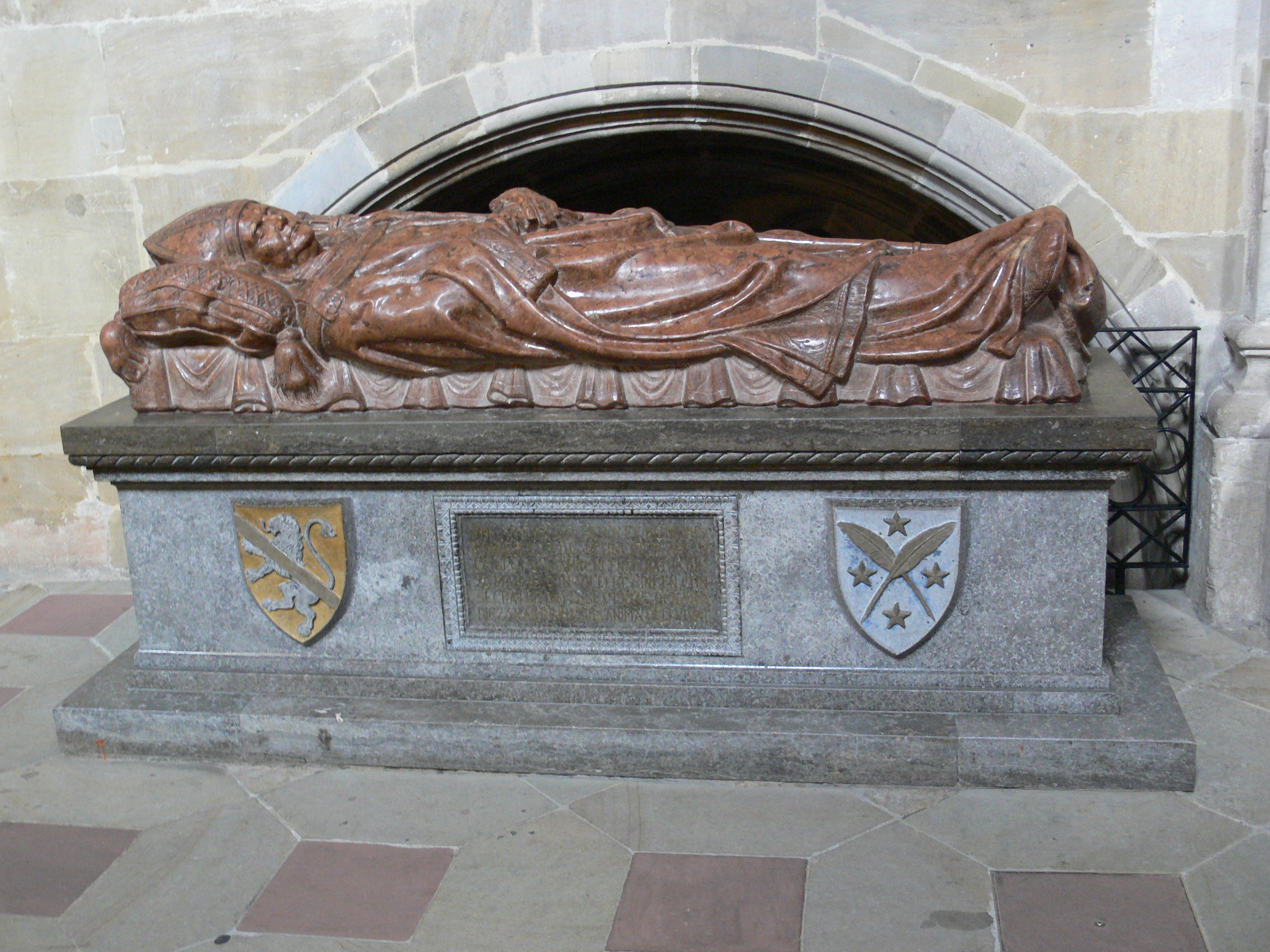 Bamberg, Dom Grabtumba des Erzbischofs Friedrich von Schreiber